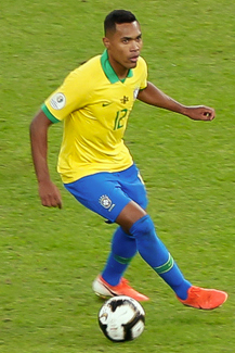 (Rio de Janeiro - RJ, 07/07/2019) Presidente da República, Jair Bolsonaro, durante a final da Copa América 2019, entre as seleções do Brasil e Peru. Foto: Carolina Antunes/PR